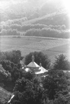 Кулаківці (Заліщицький район Тернопільської області). Загальний вид на церкву. Вигляд з північного сходу.